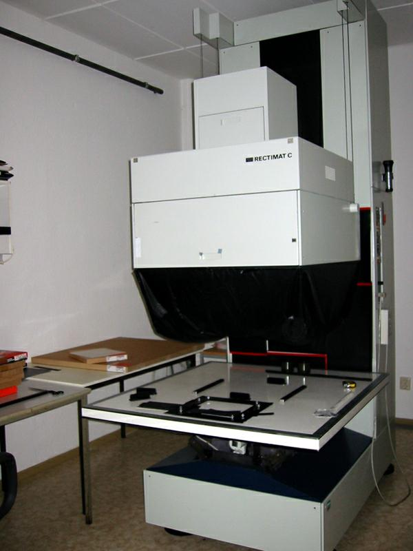 Vergrößerungsgerät Rectimat C (Gerät aus DDR-Beständen)